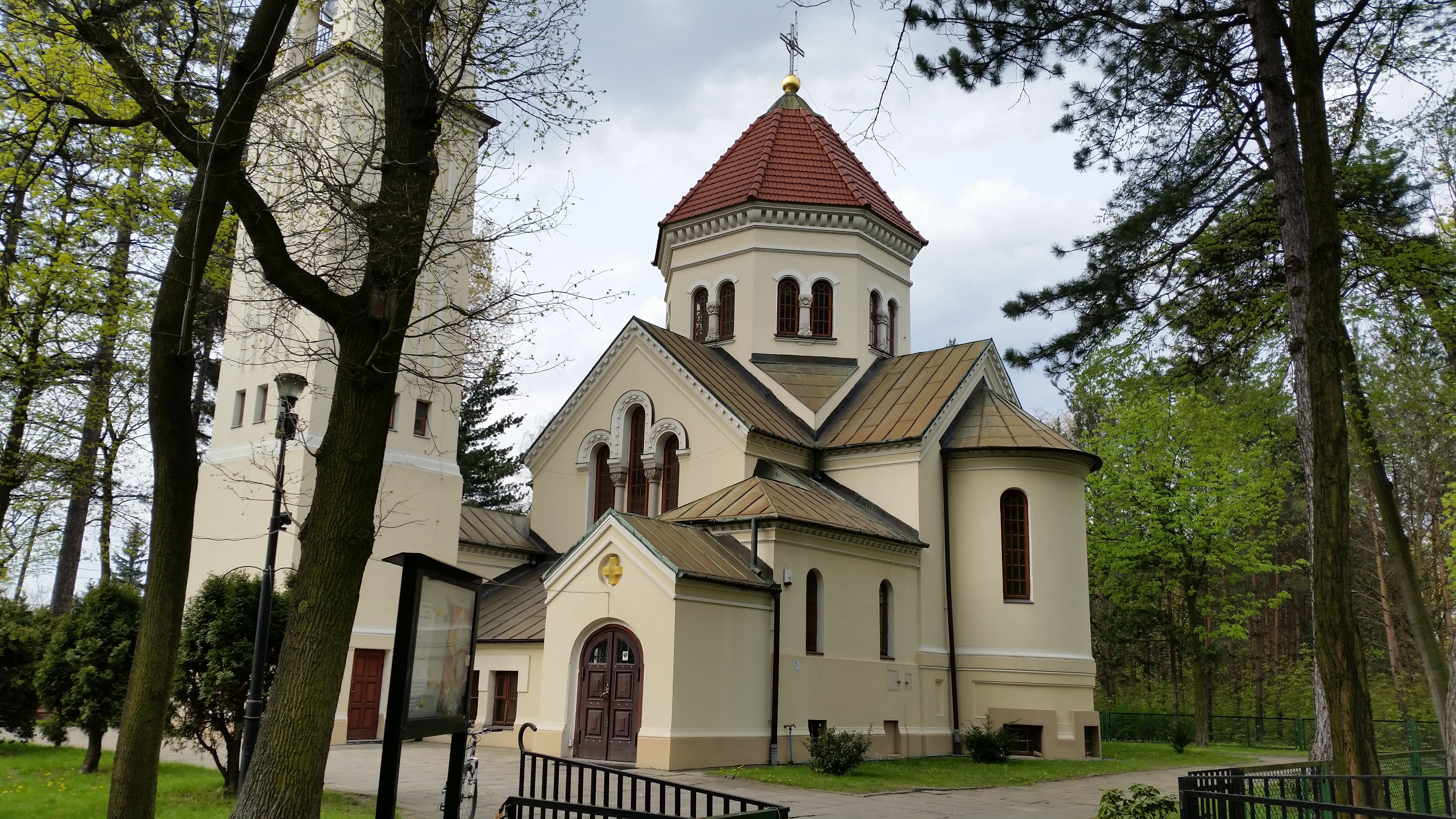 Kościół Przemienienia Pańskiego w Pruszkowie - widok od strony szpitala tworkowskiego